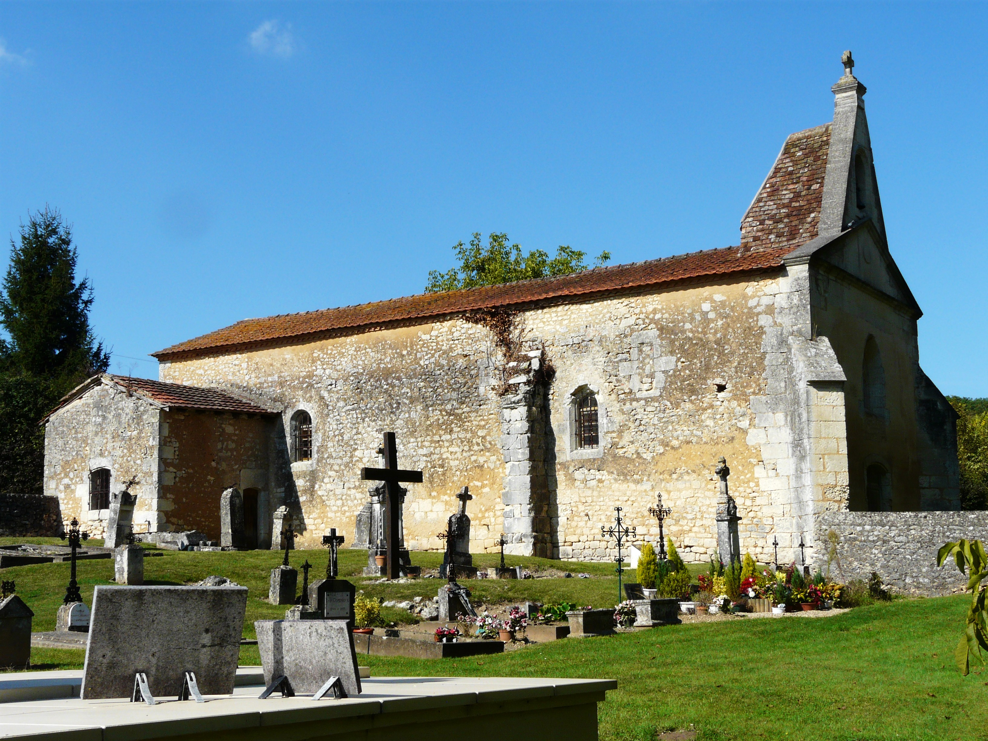 L'église Saint-Maurice, Saint-Laurent-des-Bâtons, Dordogne, France